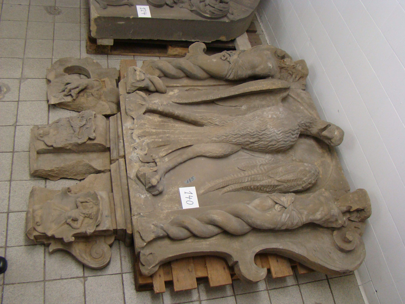 Stadtadler mit Wappen der Patrizierfamilien Walter und Weinmann auf den Kosolsteinen vom Fleischhaus in Heilbronn, heute im Lapidarium in Heilbronn